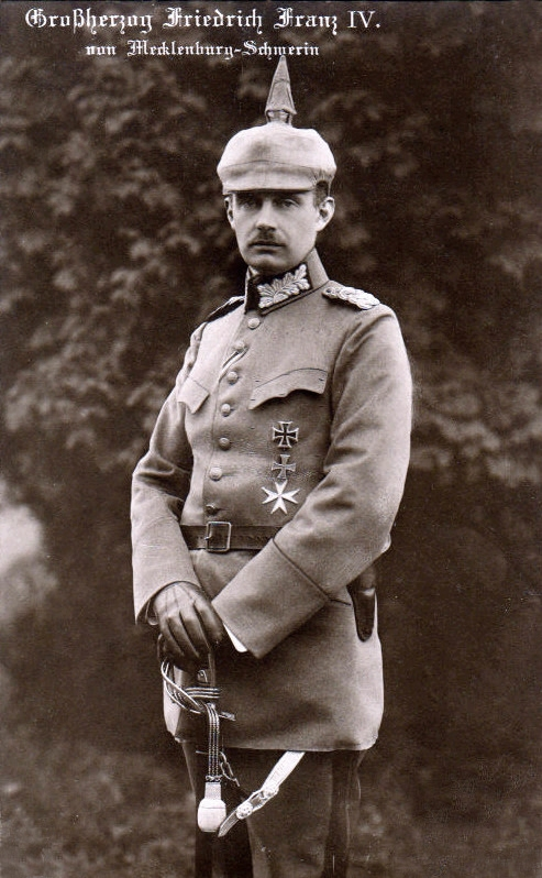 Großherzog Friedrich Franz IV. zu Mecklenburg